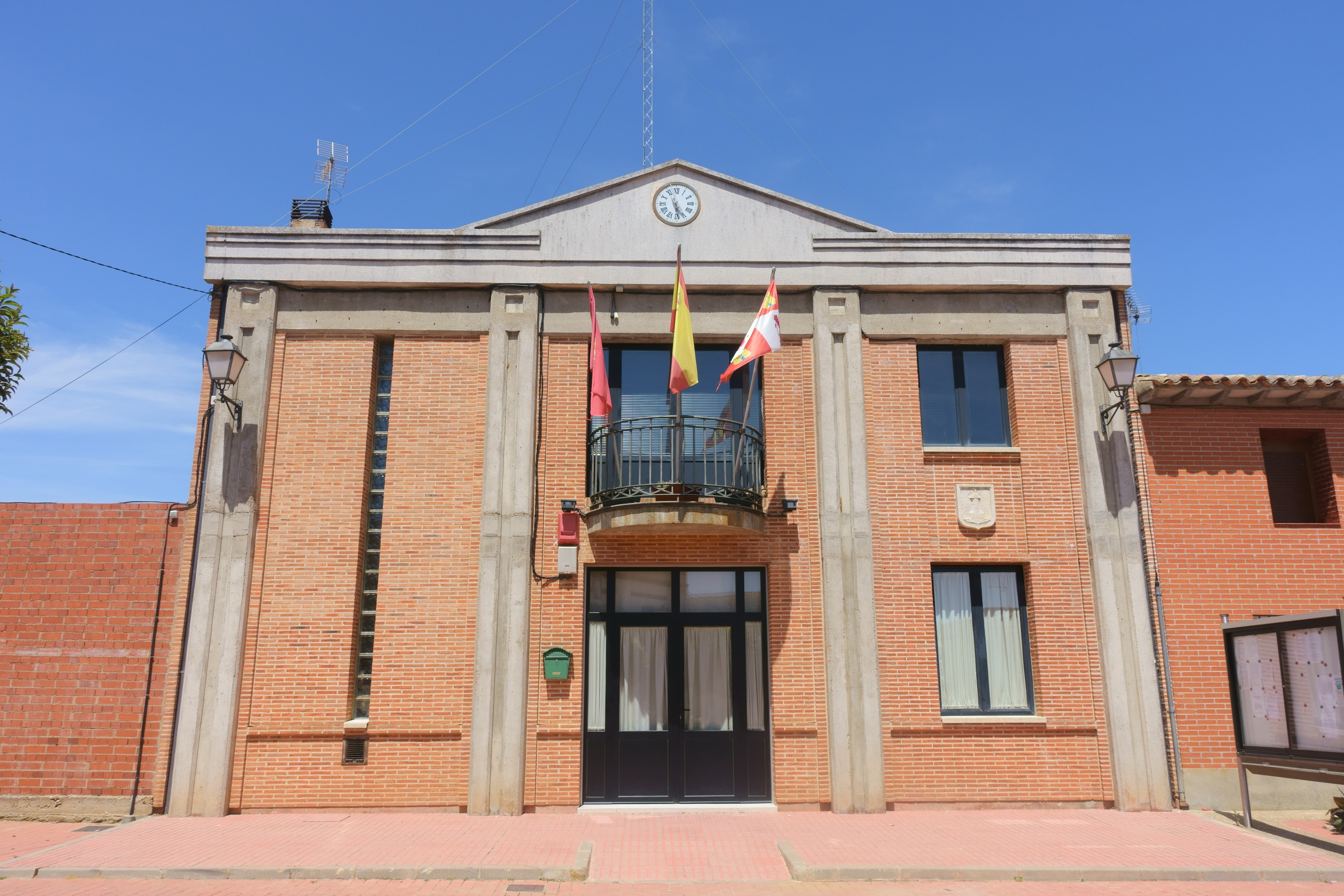 Casa consistorial de Morales de Campos (Valladolid, España).